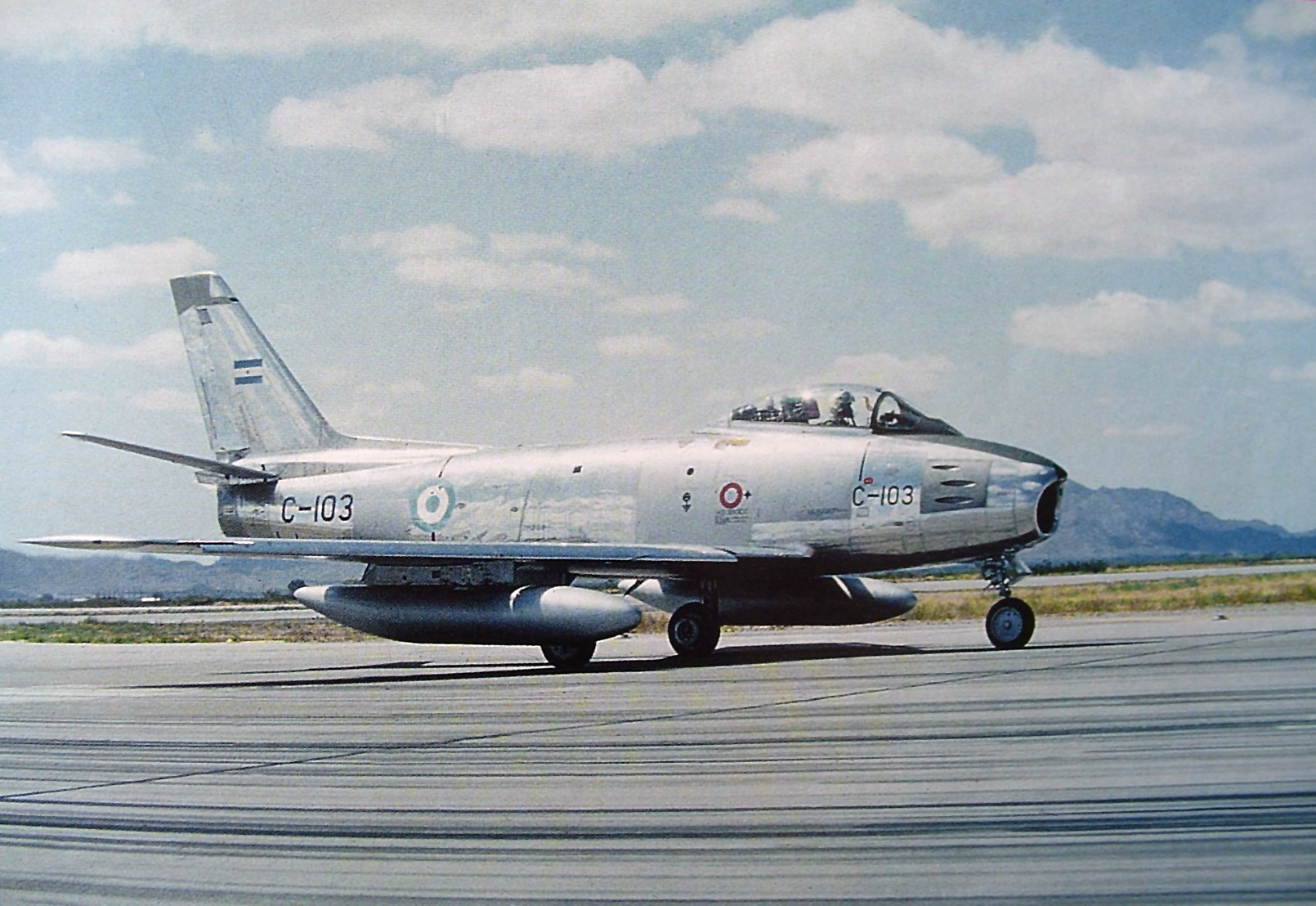 OPERACIÓN SABRE El 26 de septiembre de 1960, arriban a la IV Brigada Aérea Mendoza el primer grupo de cazabombarderos North American F-86F-30 NA Sabre. El vuelo ferry, liderado por el comodoro Jorge Miguel Martínez Zuviría, comenzó el 6 de setiembre, desde la AFB Williams (Arizona). El segundo grupo, llega el 10 de diciembre. Con la recepción de todo el material, se reactiva el Grupo 1 de Caza Bombardeo. La incorporación del Sabre marca un punto de inflexión en las unidades de caza de